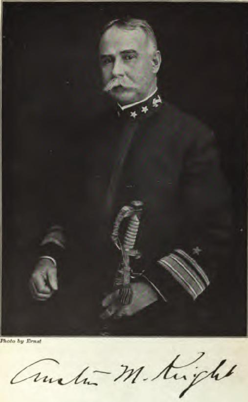 Austin Melvin Knight